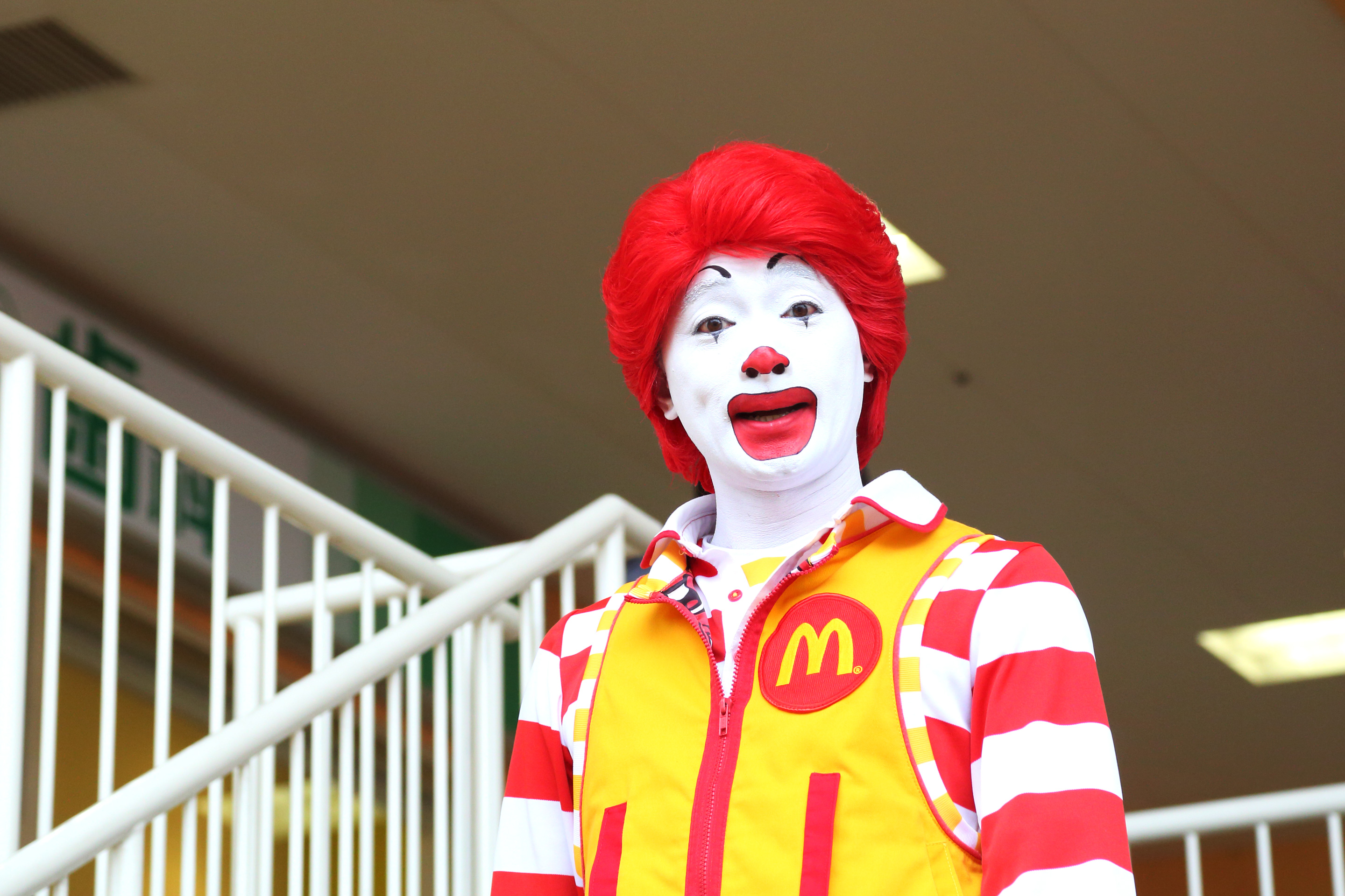 人間による実写版のドナルド・マクドナルド